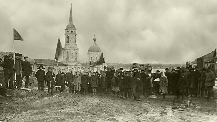 Село Новодевичье, 20-е годы, демонстрация на ул. "Красная"